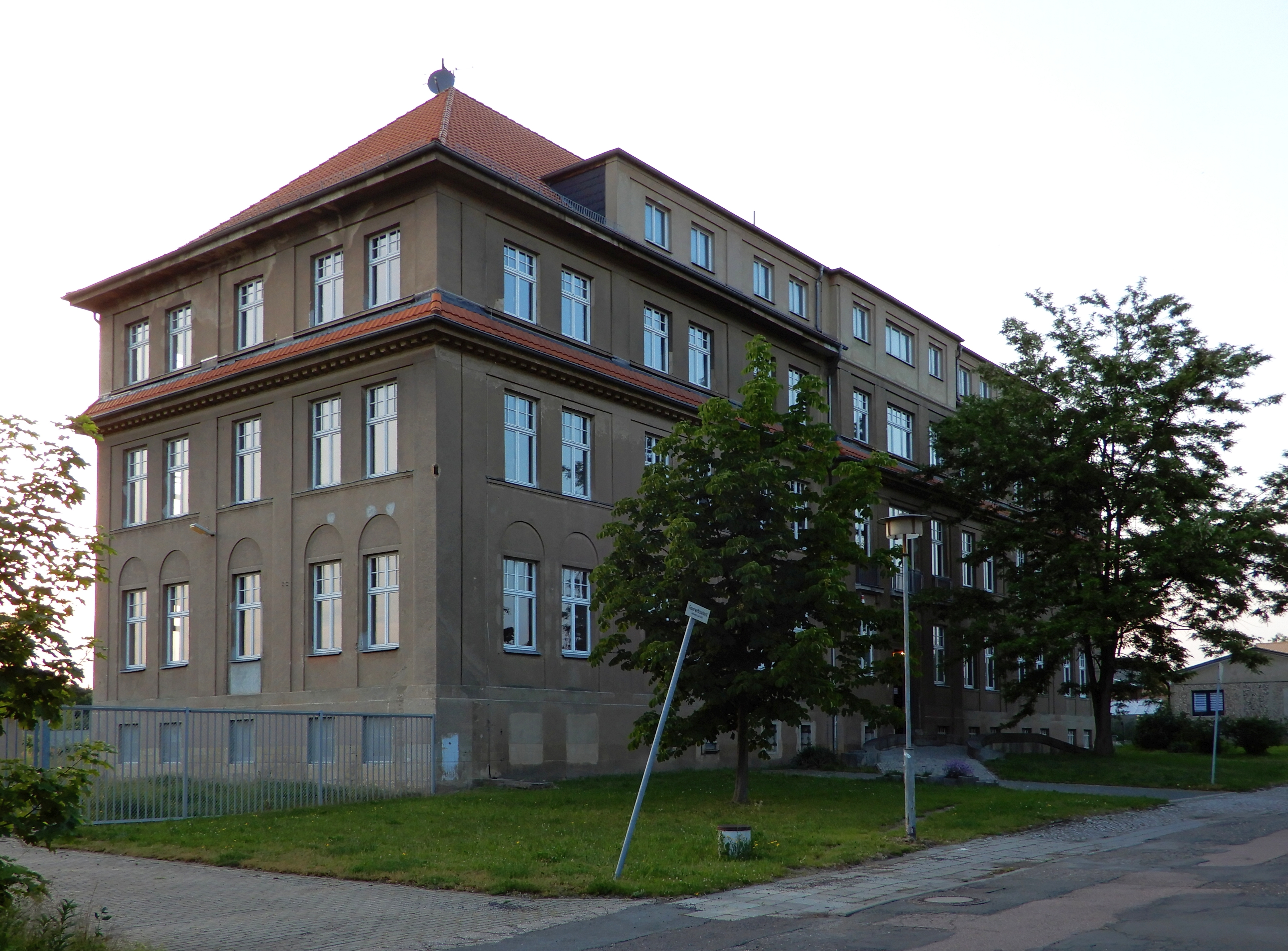 Verwaltungsgebäude Dr.-Wilhelm-Feit-Straße 26 in Aschersleben